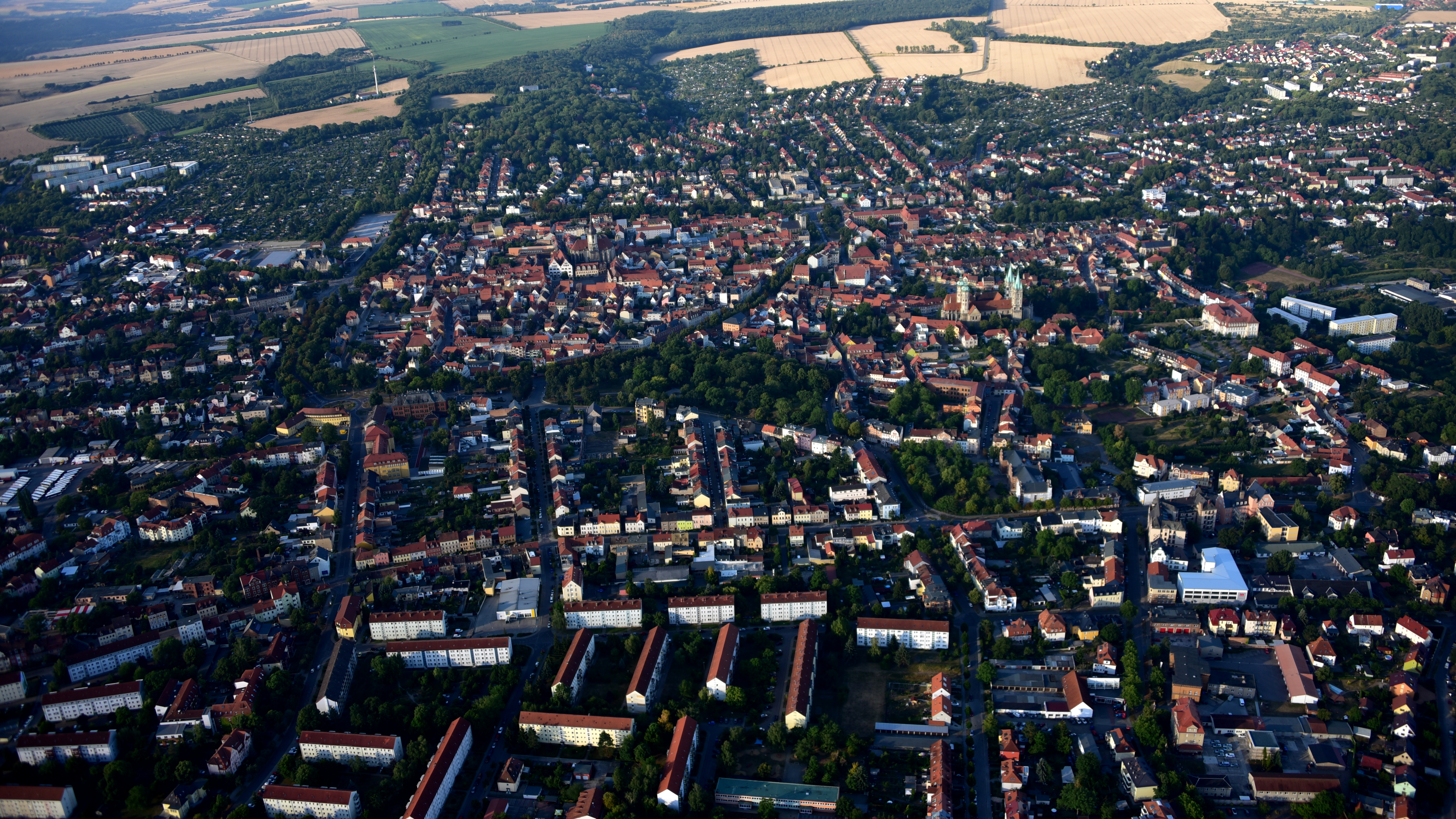 Naumburg (Saale), Luftaufnahme (2018)